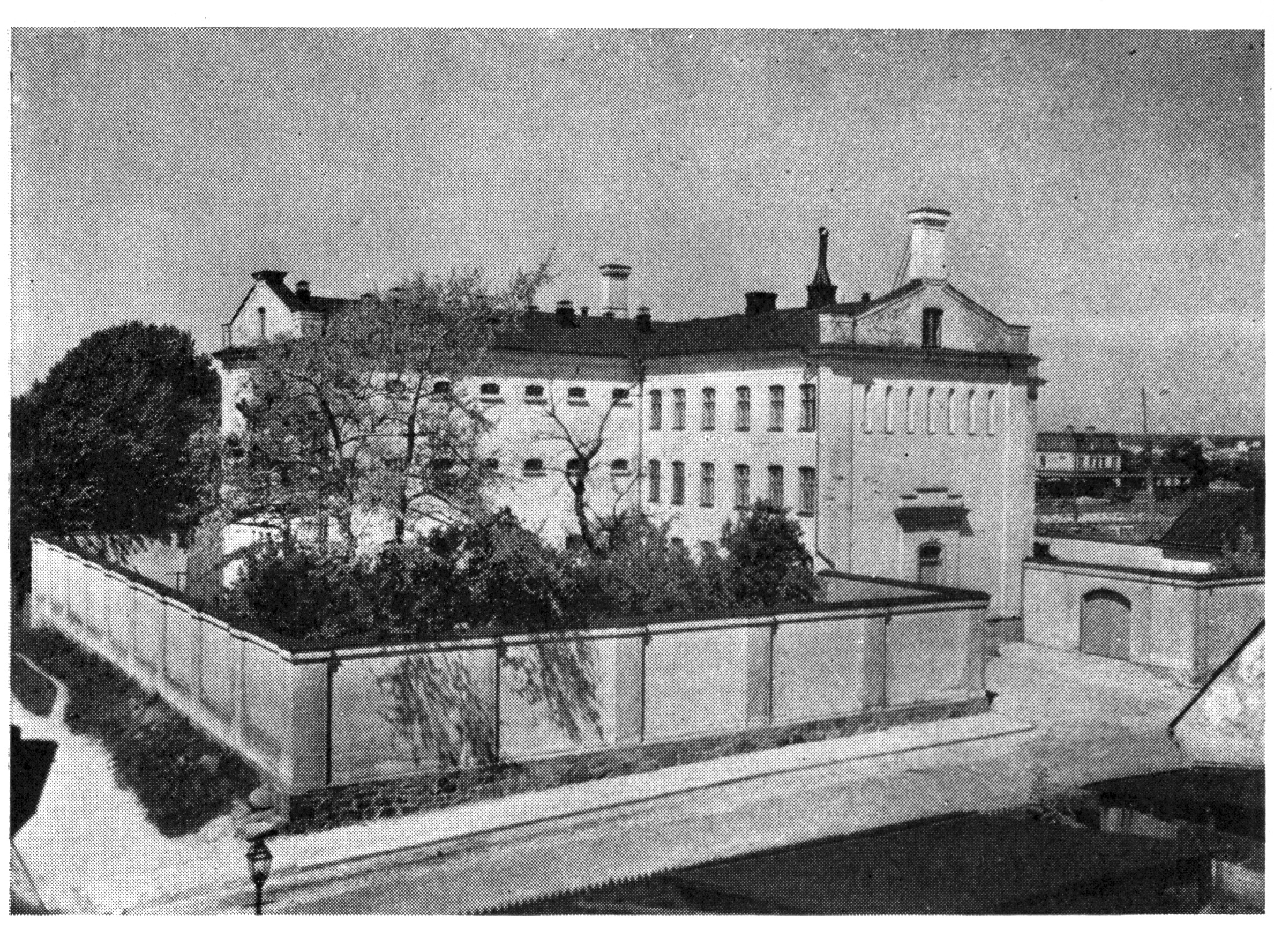 Länsfängelset i Karlskrona